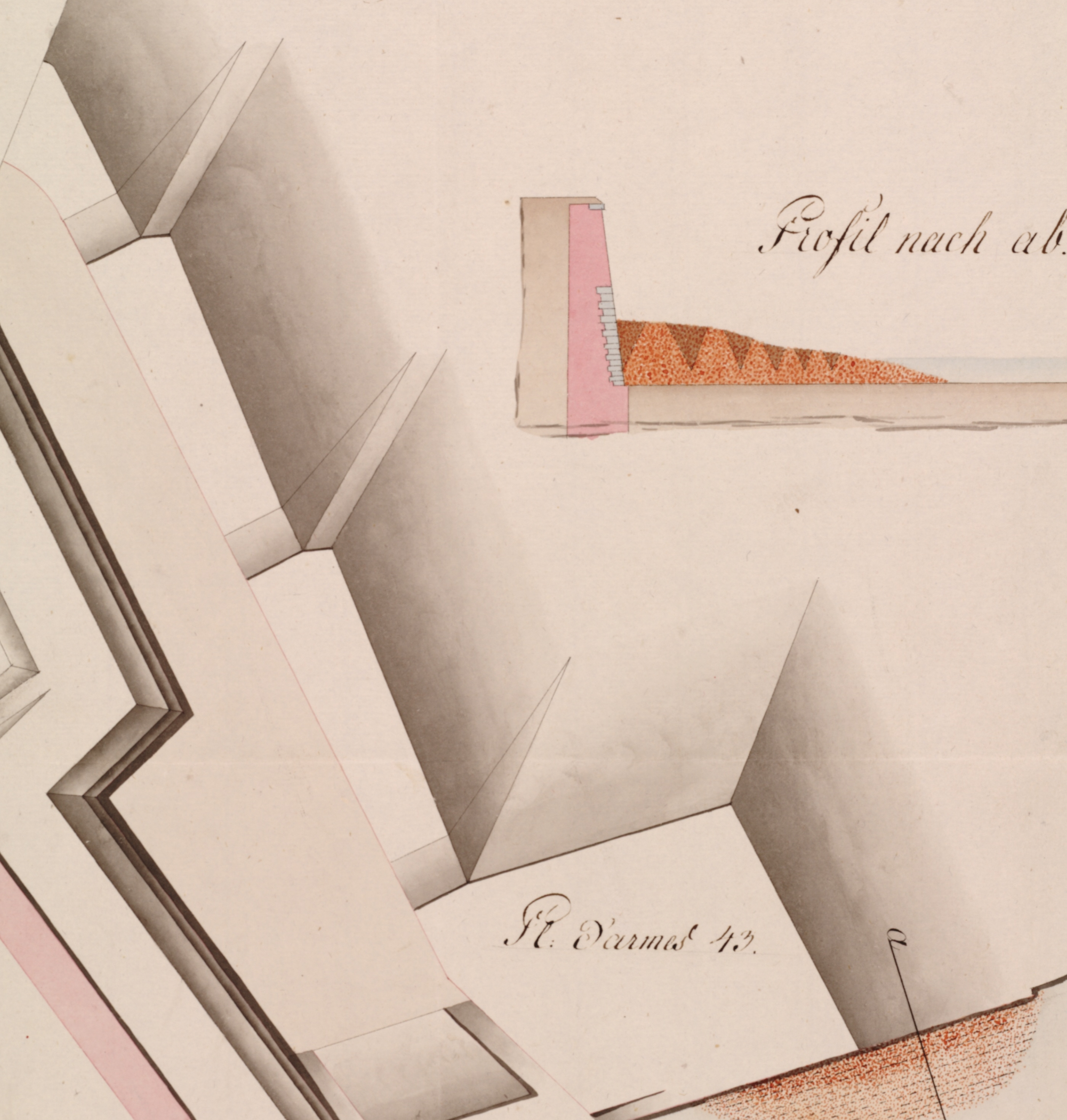 Fortifikační plán pevnosti - deatilní ukázka stínování